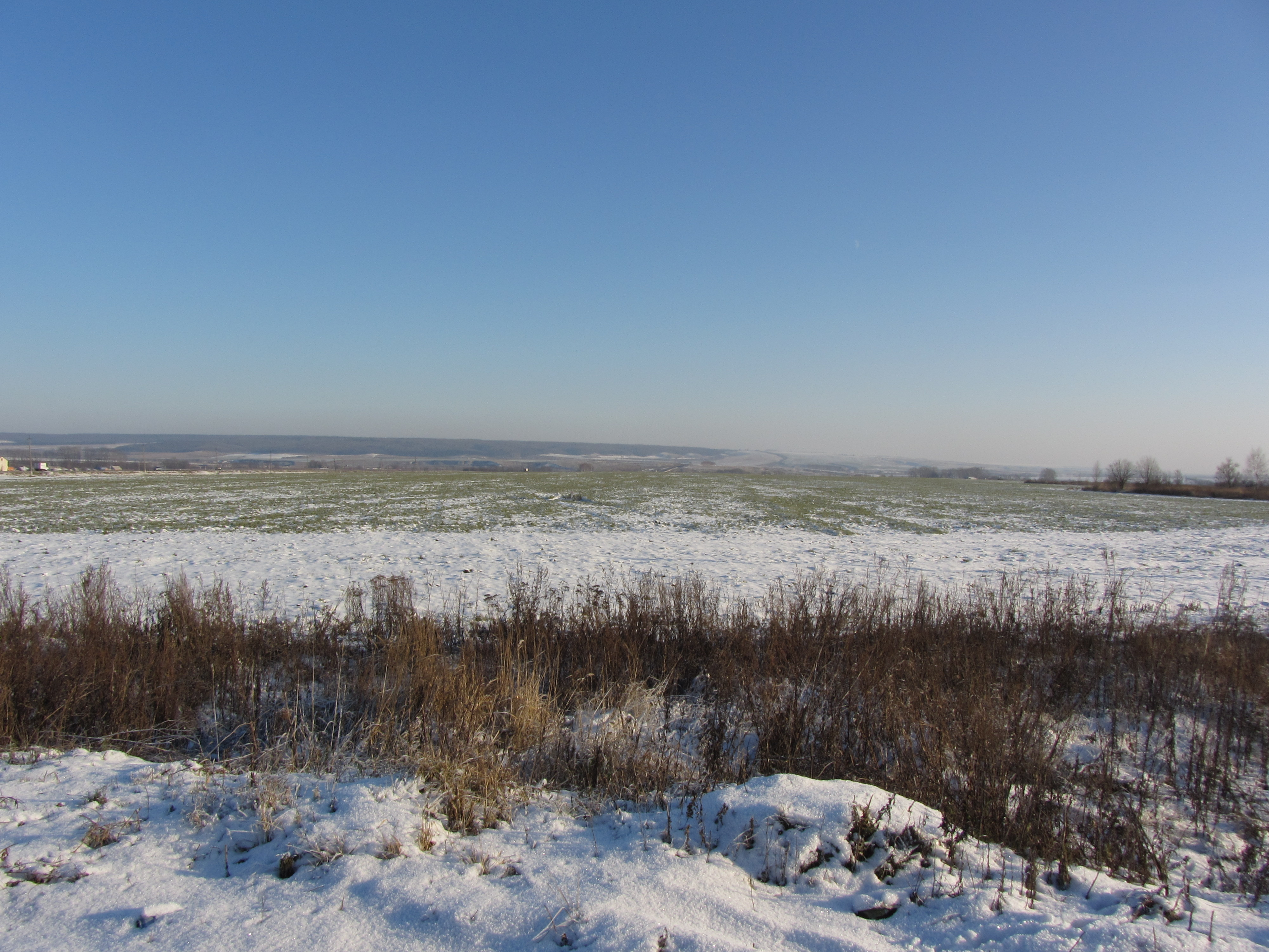 горизонт